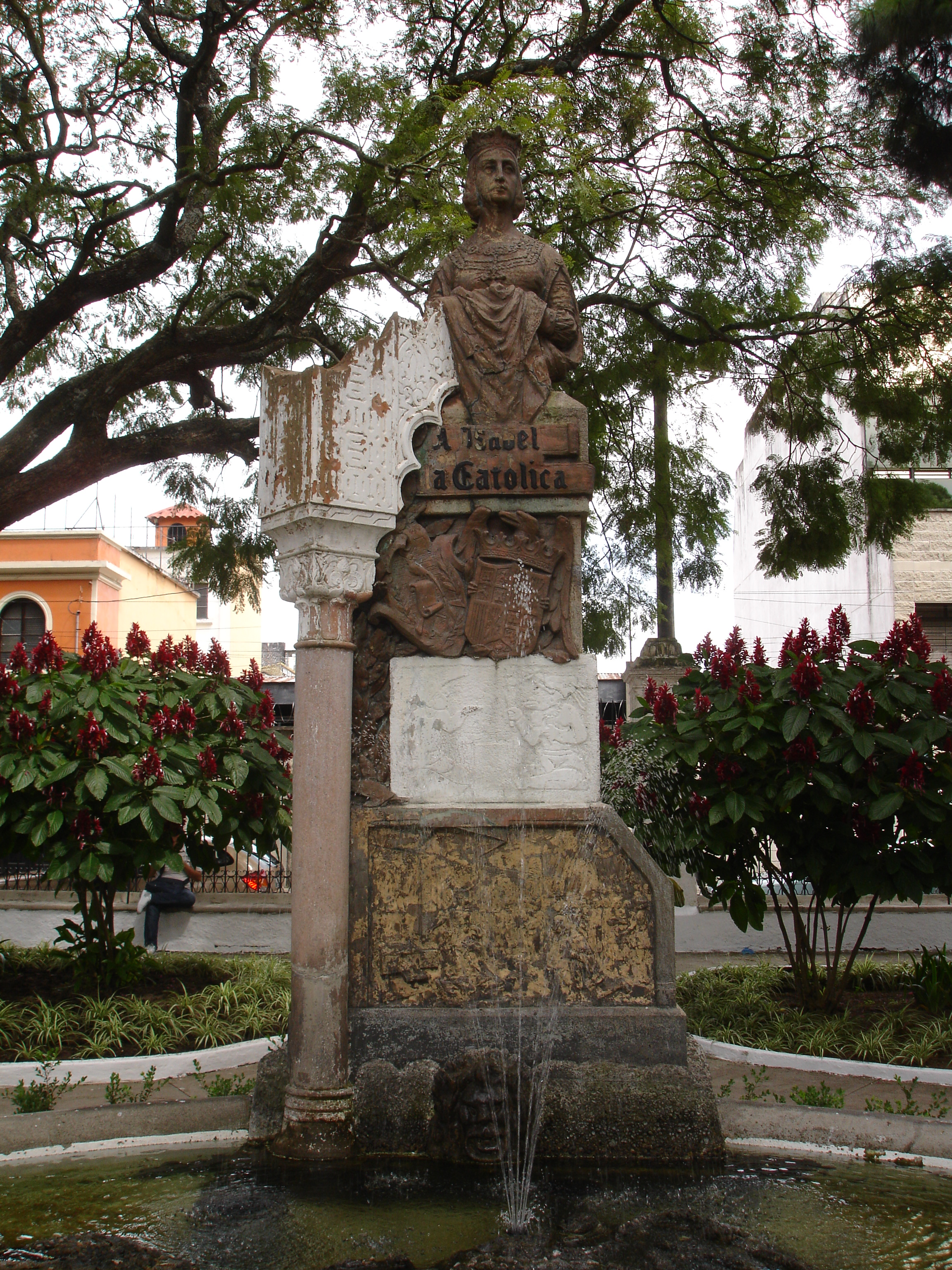 Ubicado en zona 1, Ciudad de Guatemala